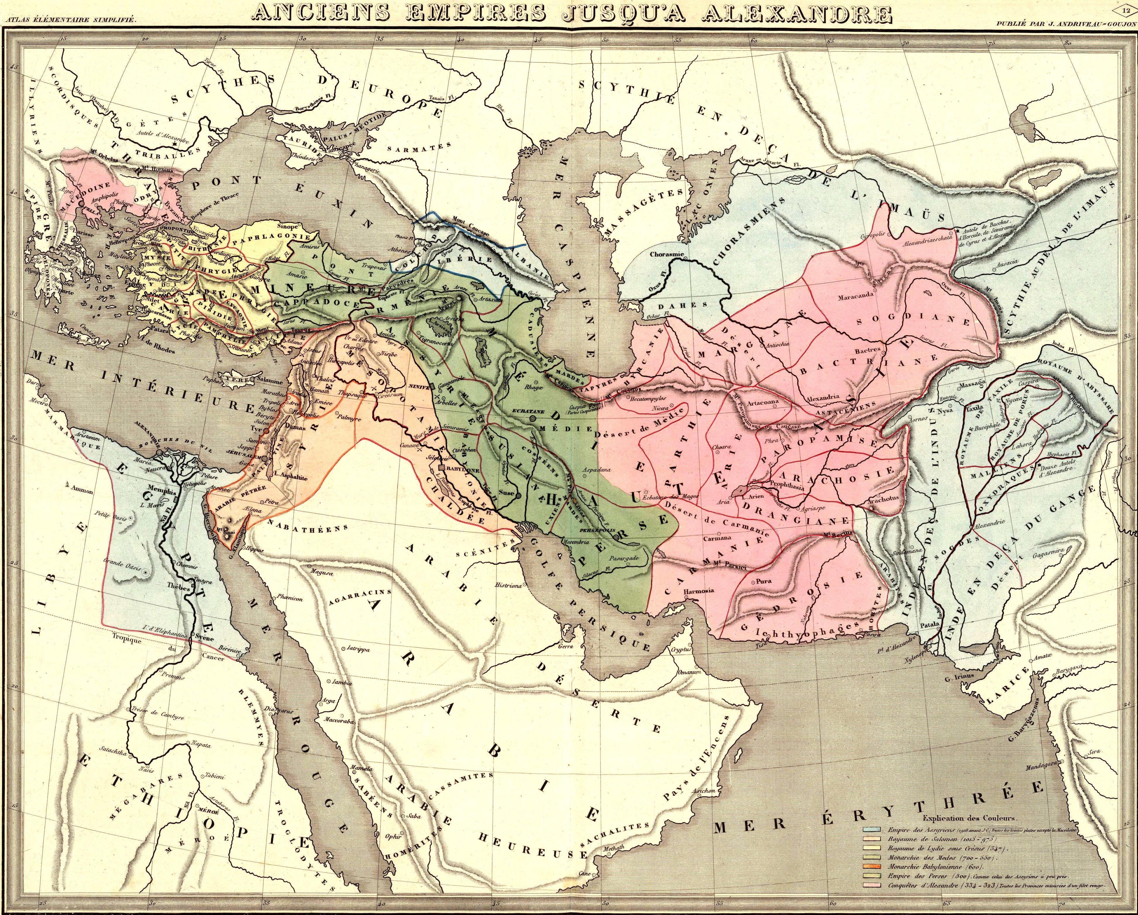 Anciens Empires Jusqu'a Alexandre. Atlas Élémentaire Simplifié. Publié par J. Andriveau-Goujon. E. Soulier, del. À Paris, chez Andriveau-Goujon, Éditeur, Rue du Bac, No. 17. Revu par Mr. Hase, Membre de l'Institut.